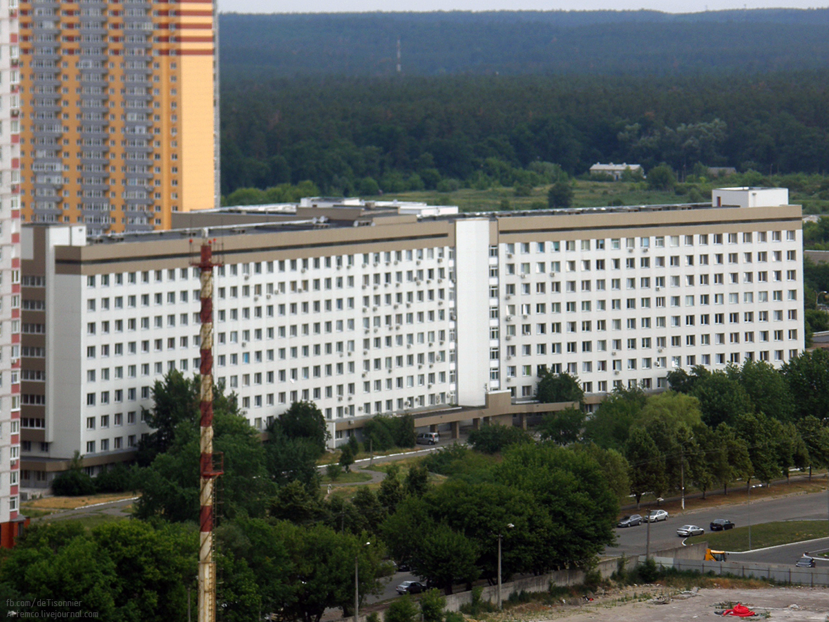 Киевская городская больница № 8